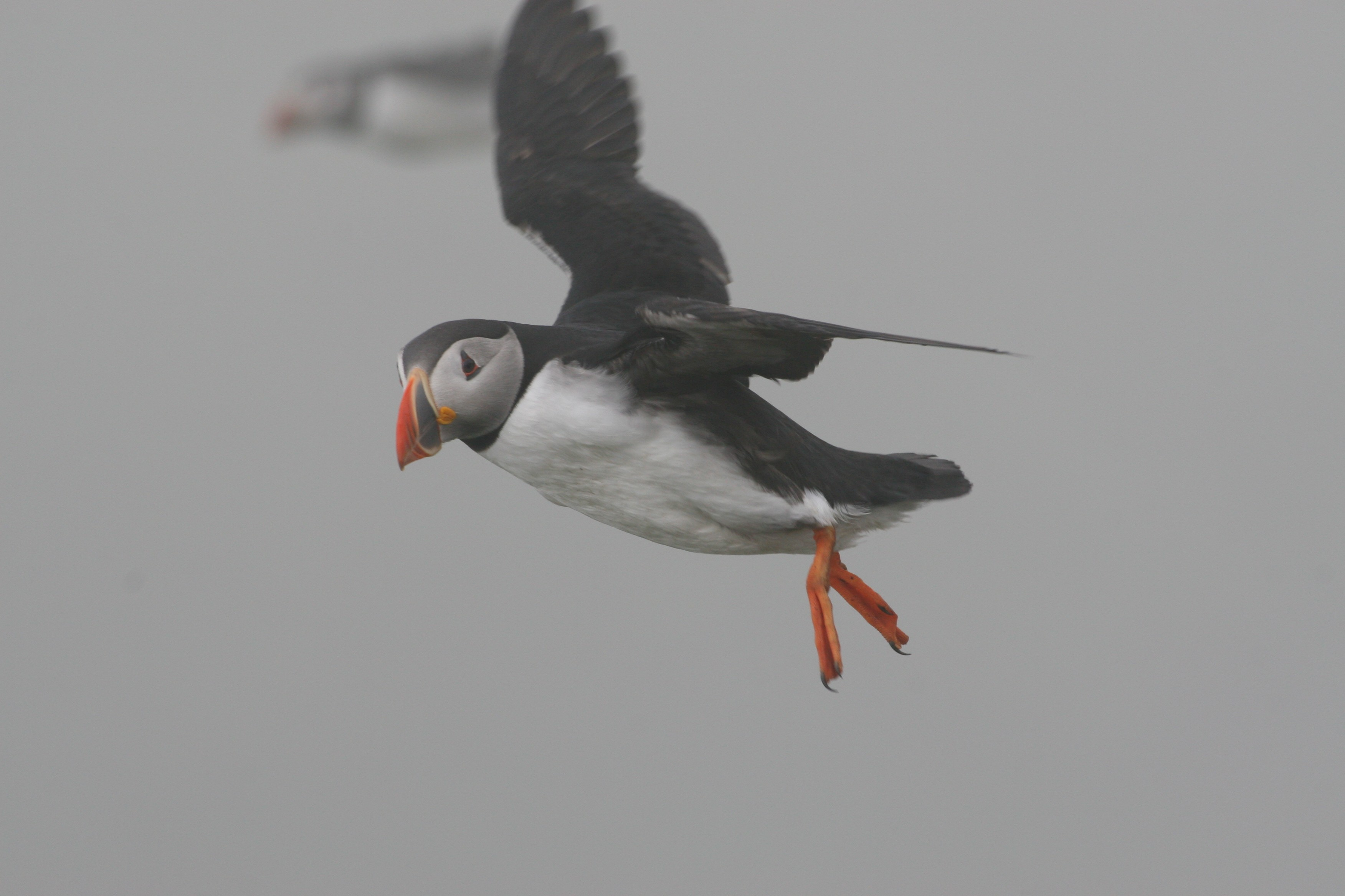 Papageitaucher (Fratercula arctica) über Mykines, Färöer